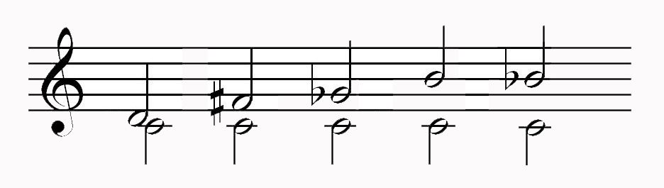 Srpskohrvatski / српскохрватски: Disonance, autor: Radivoj Lazić, lični rad, 23. 8. 2012.